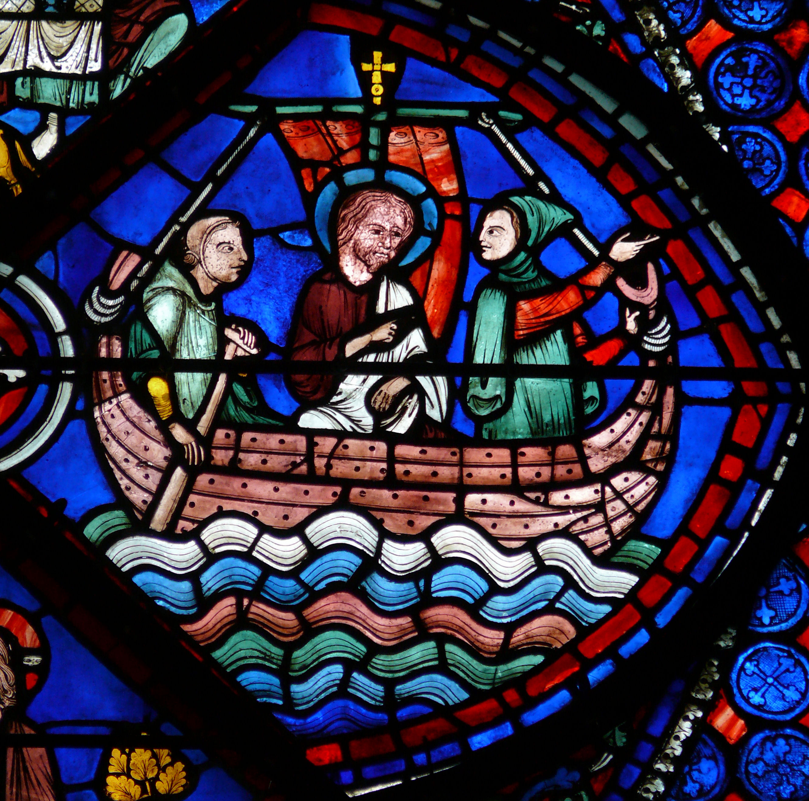 Cathédrale de Chartres - Chapelles - Vitrail de la Vie de saint Thomas - Détail